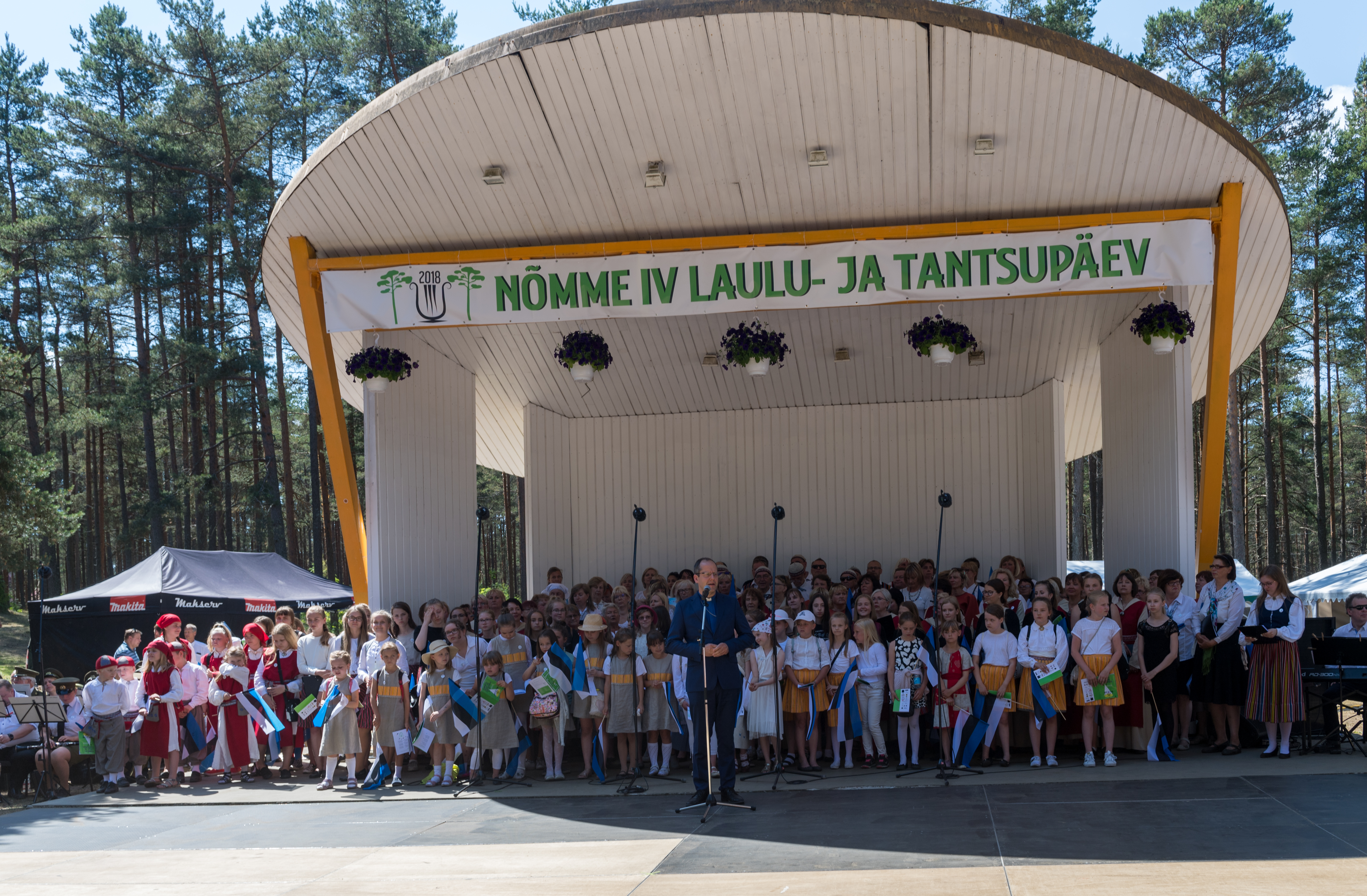 Nõmme IV laulu- ja tantsupäev 17. juunil 2018.